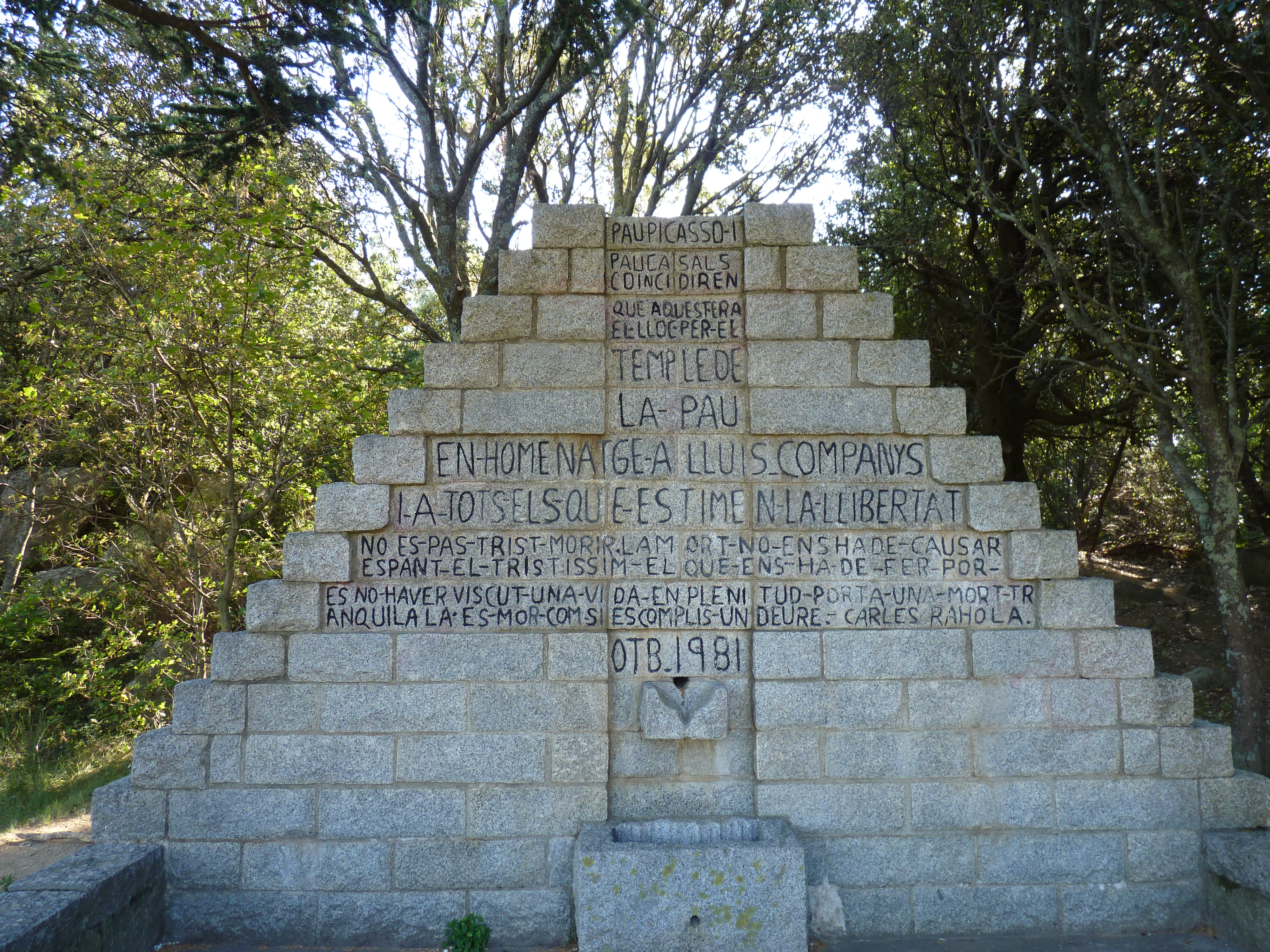 Vue détaillée du mémorial Lluís Companys au Coll de Manrella, Agullana (Haut-Ampurdan, Gérone, Catalogne, Espagne)